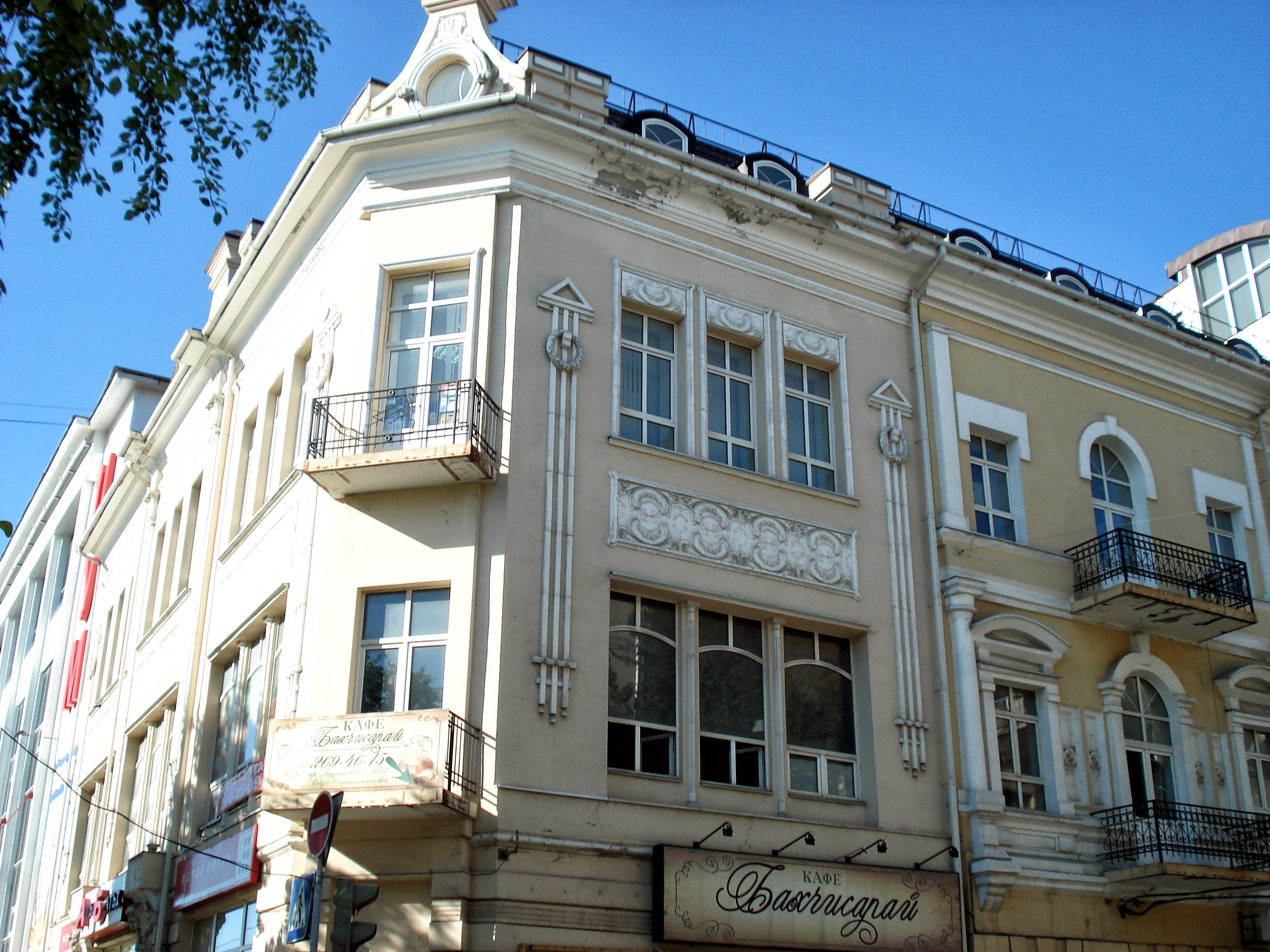 Доходный дом К.Х. Бахчисарайцева: проспект Буденновский, 26/57, улица Социалистическая, литер А, Ростов-на-Дону, Ростовская область